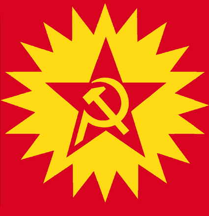 Logo von SoL